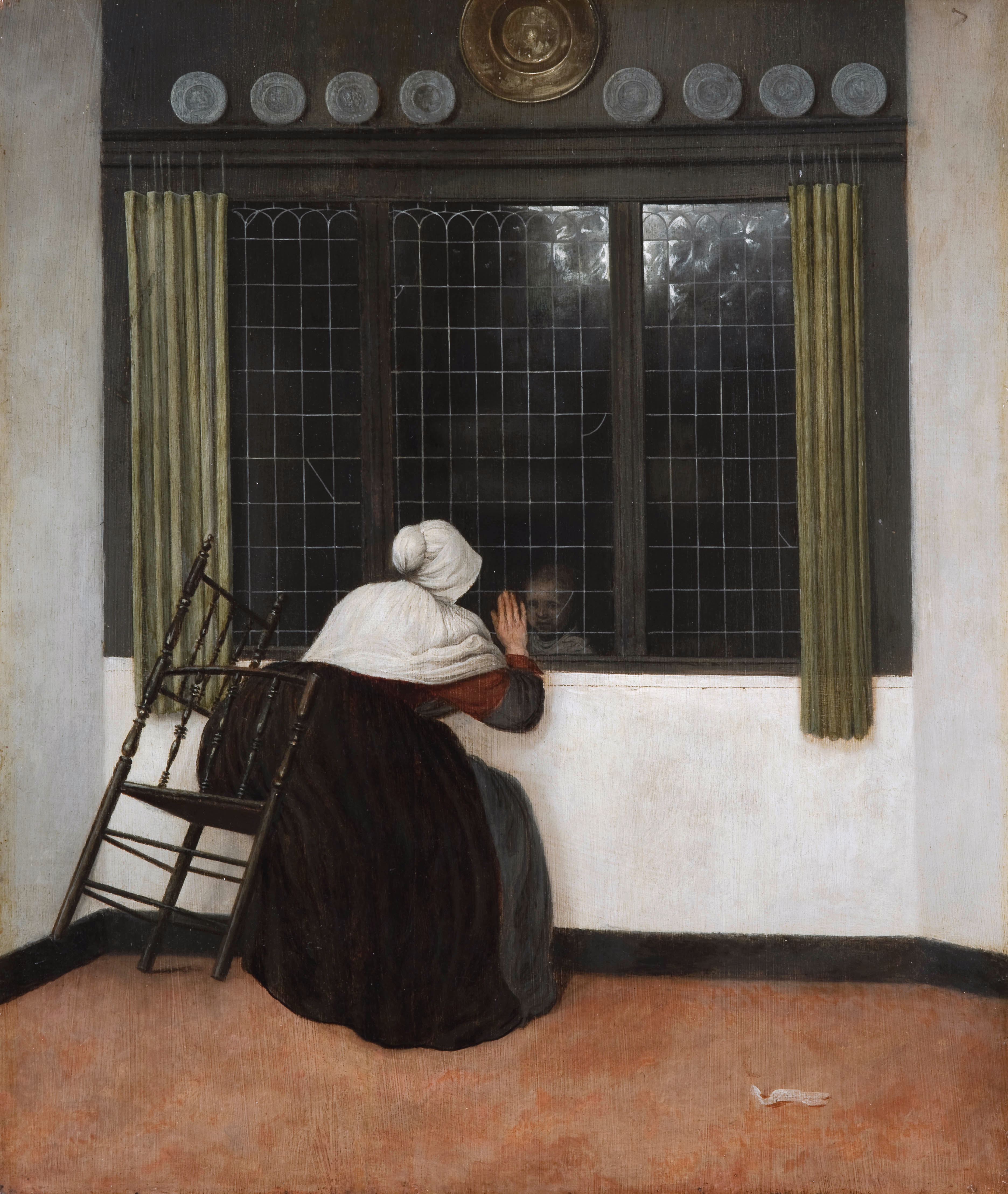 Femme à la fenêtre faisant signe à une fillettetitle QS:P1476,fr:"Femme à la fenêtre faisant signe à une fillette" label QS:Lfr,"Femme à la fenêtre faisant signe à une fillette"